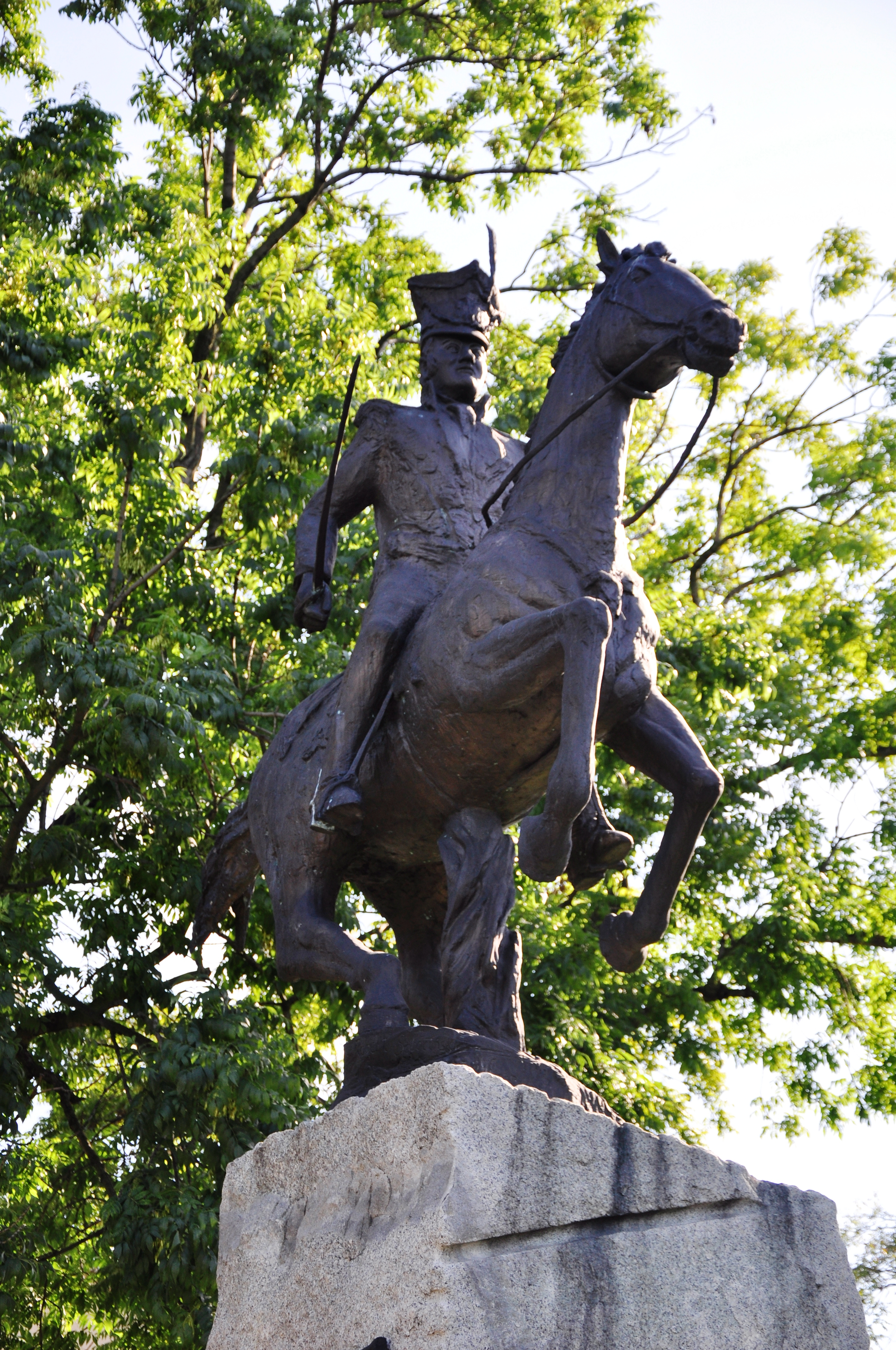 Sroda